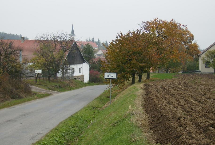 Březí u Velké Bíteše